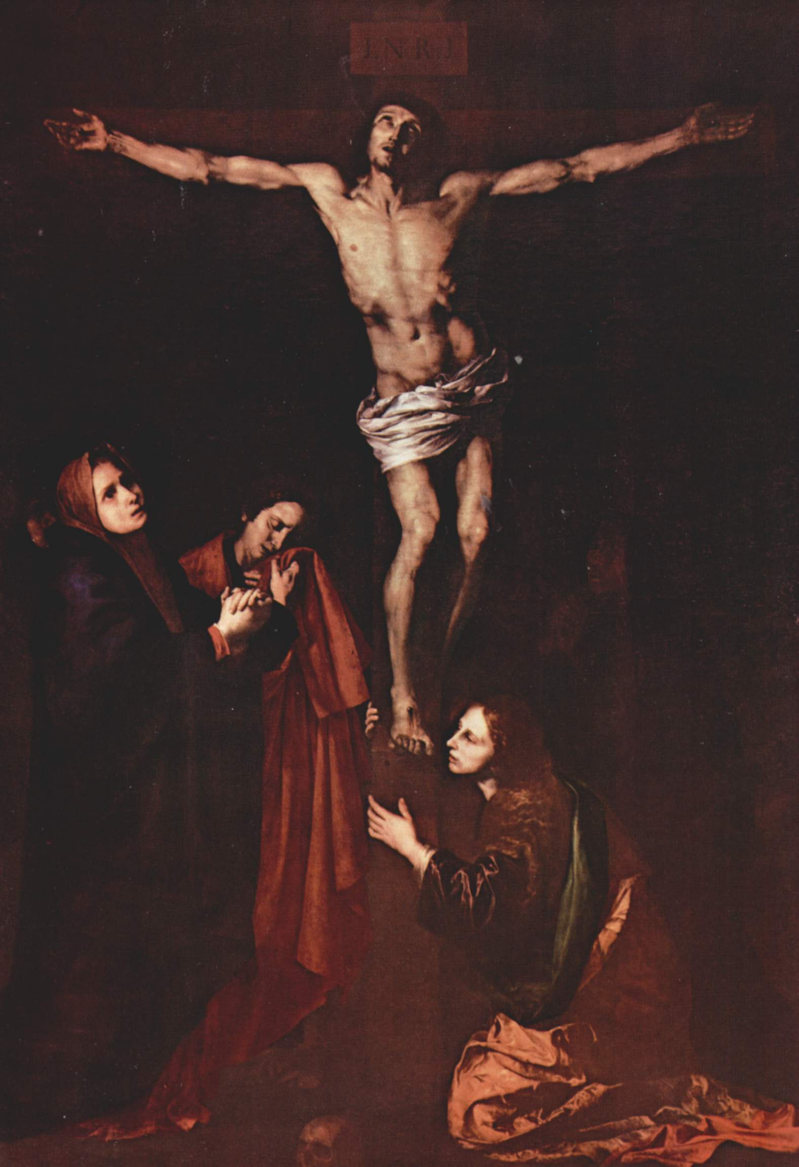 La obra muestra a Jesucristo crucificado junto a su madre, la Virgen María, y las santas mujeres.